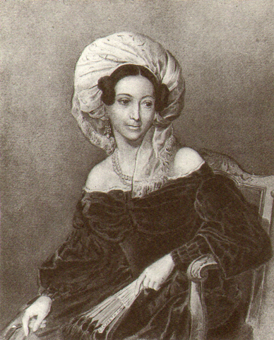 Anna Georgievna Tolstaya